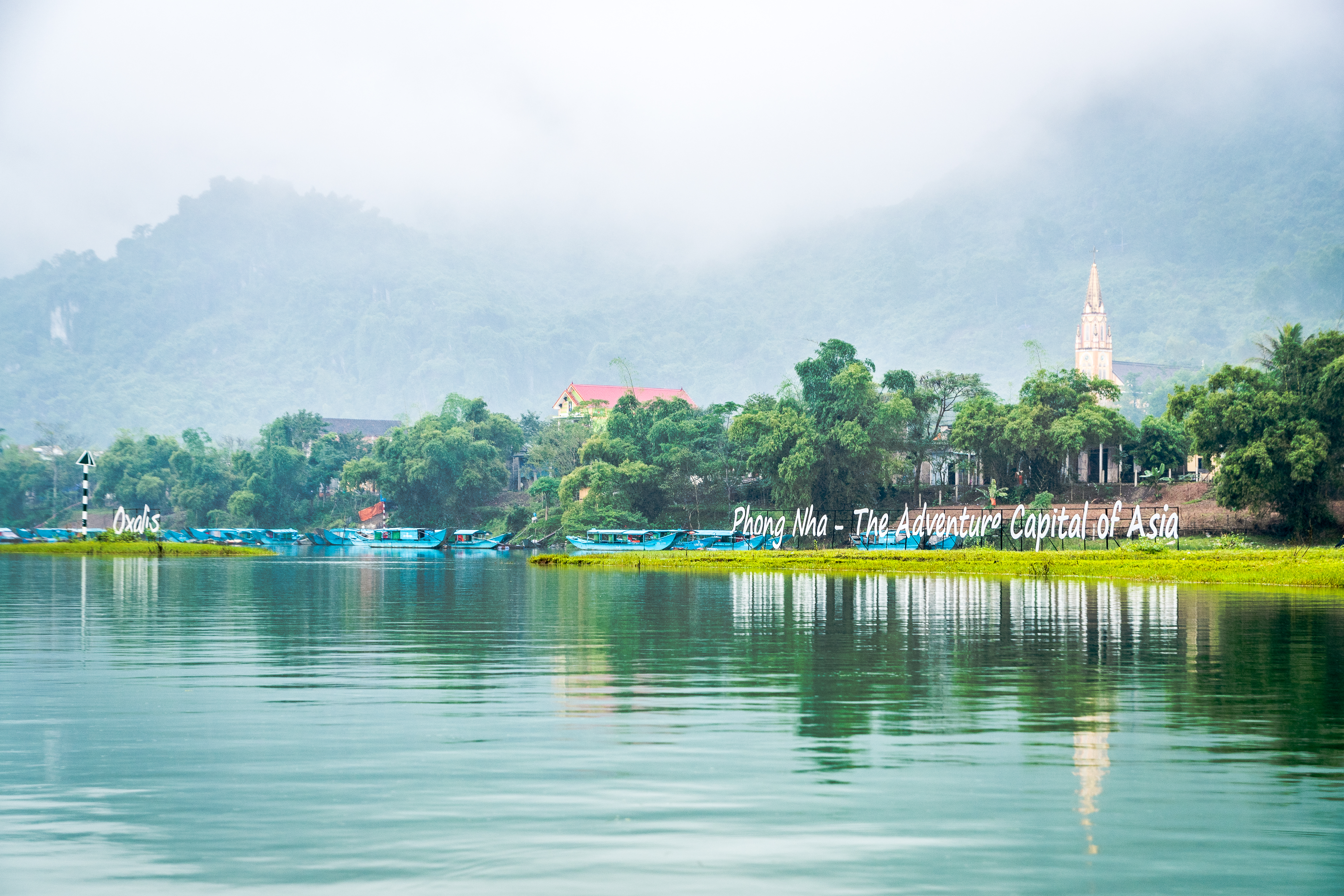 Les grottes du parc de Phong Nha-Ke Bang